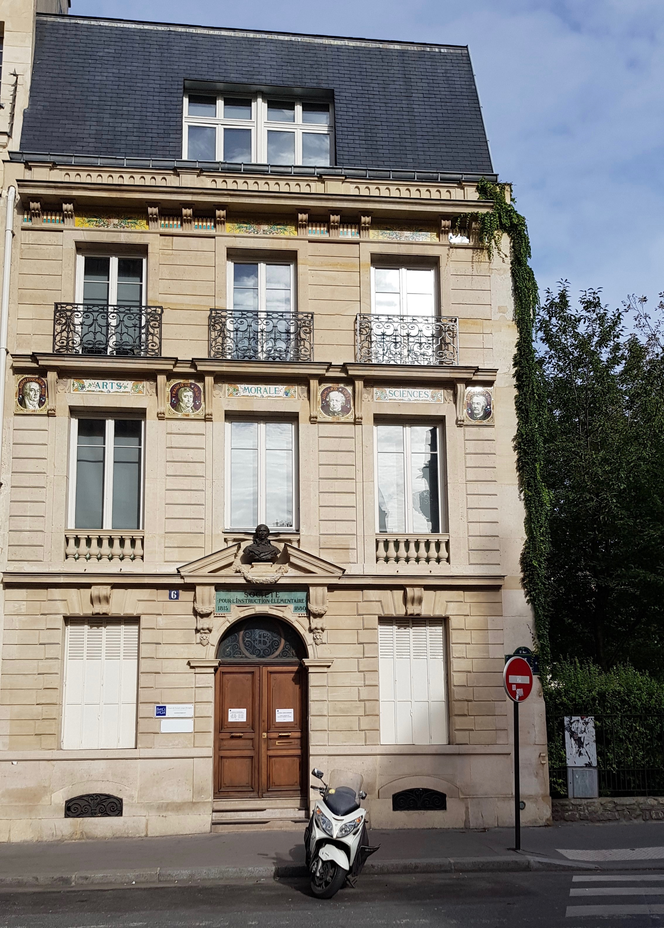 6, rue du Fouarre, Paris 5e.